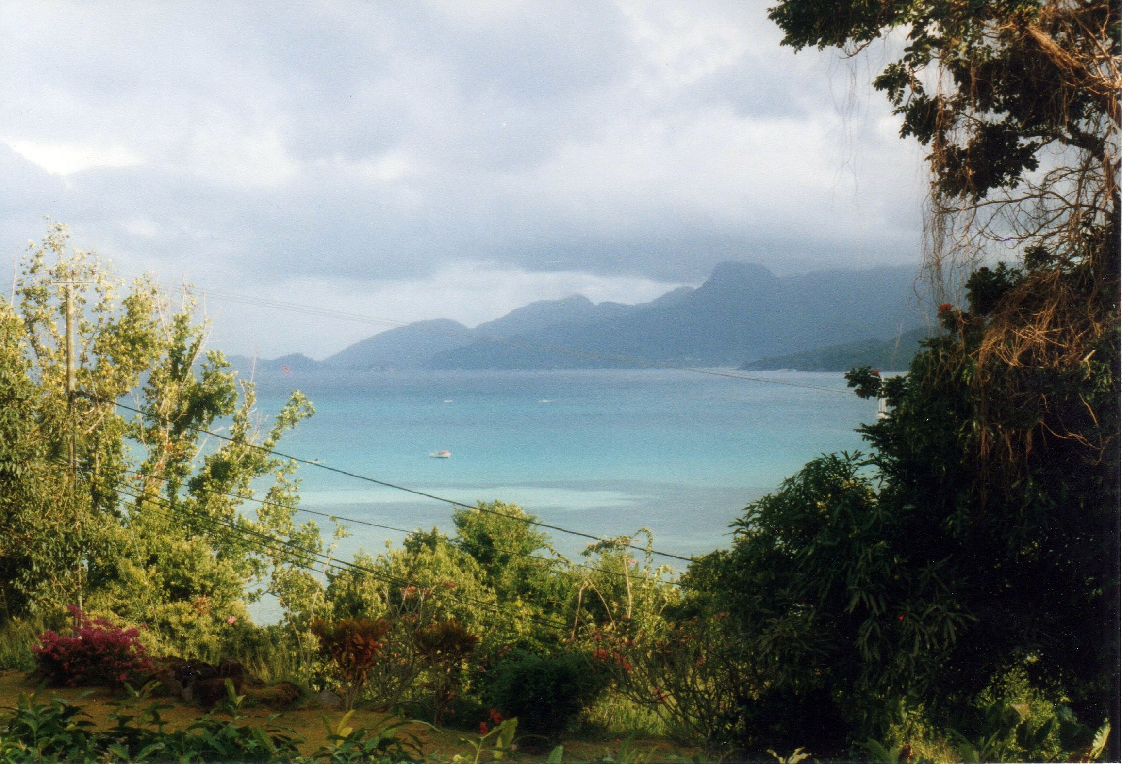 Anse à la Mouche